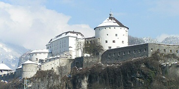 Festung Kufstein in Tirol vom Bahnhofsviertel aus